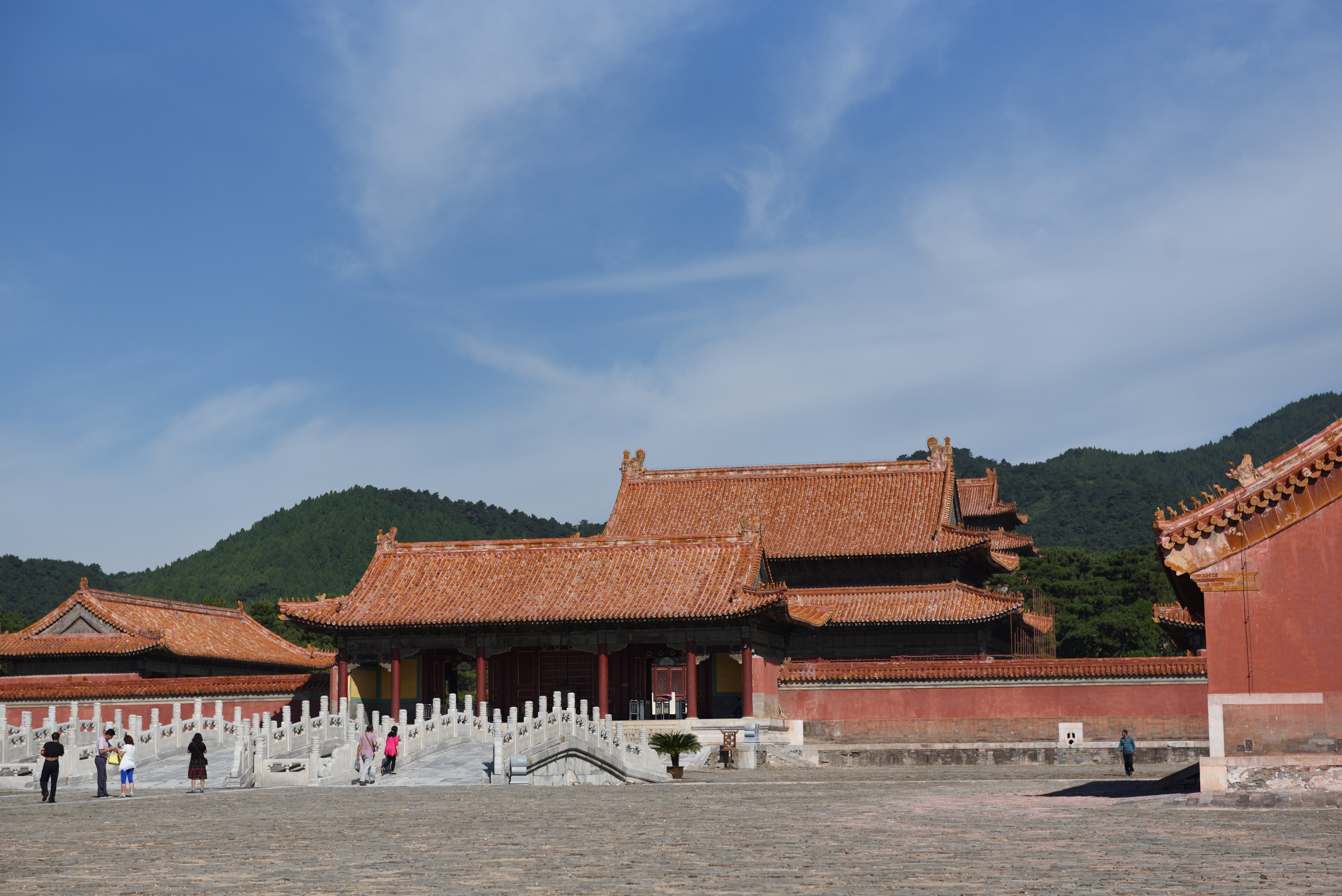 清裕陵（乾隆墓）